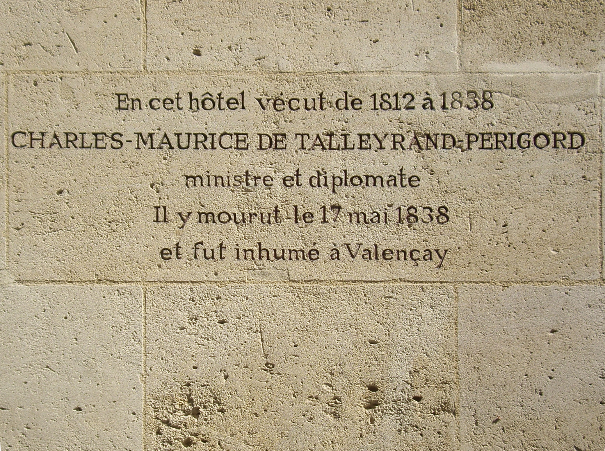 Inscription murale sur l'hôtel de Saint-Florentin, dit aussi hôtel de Talleyrand-Périgord, rue Saint-Florentin, Paris 1er, où vécut Talleyrand de 1812 jusqu'à sa mort le 17 mai 1838.